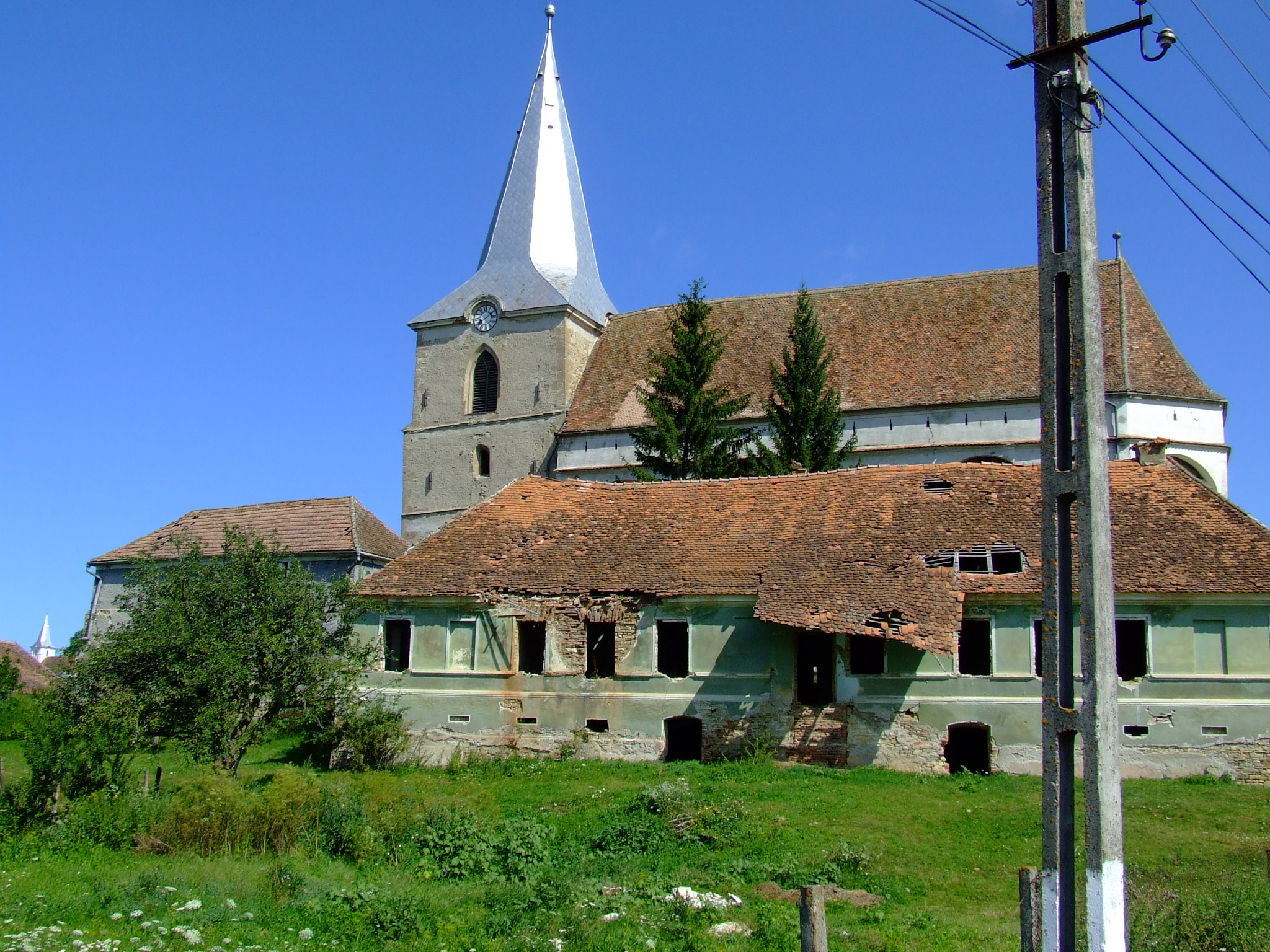 Biserica evanghelică fortificată, ruinele casei parohiale - dinalt unghi 01